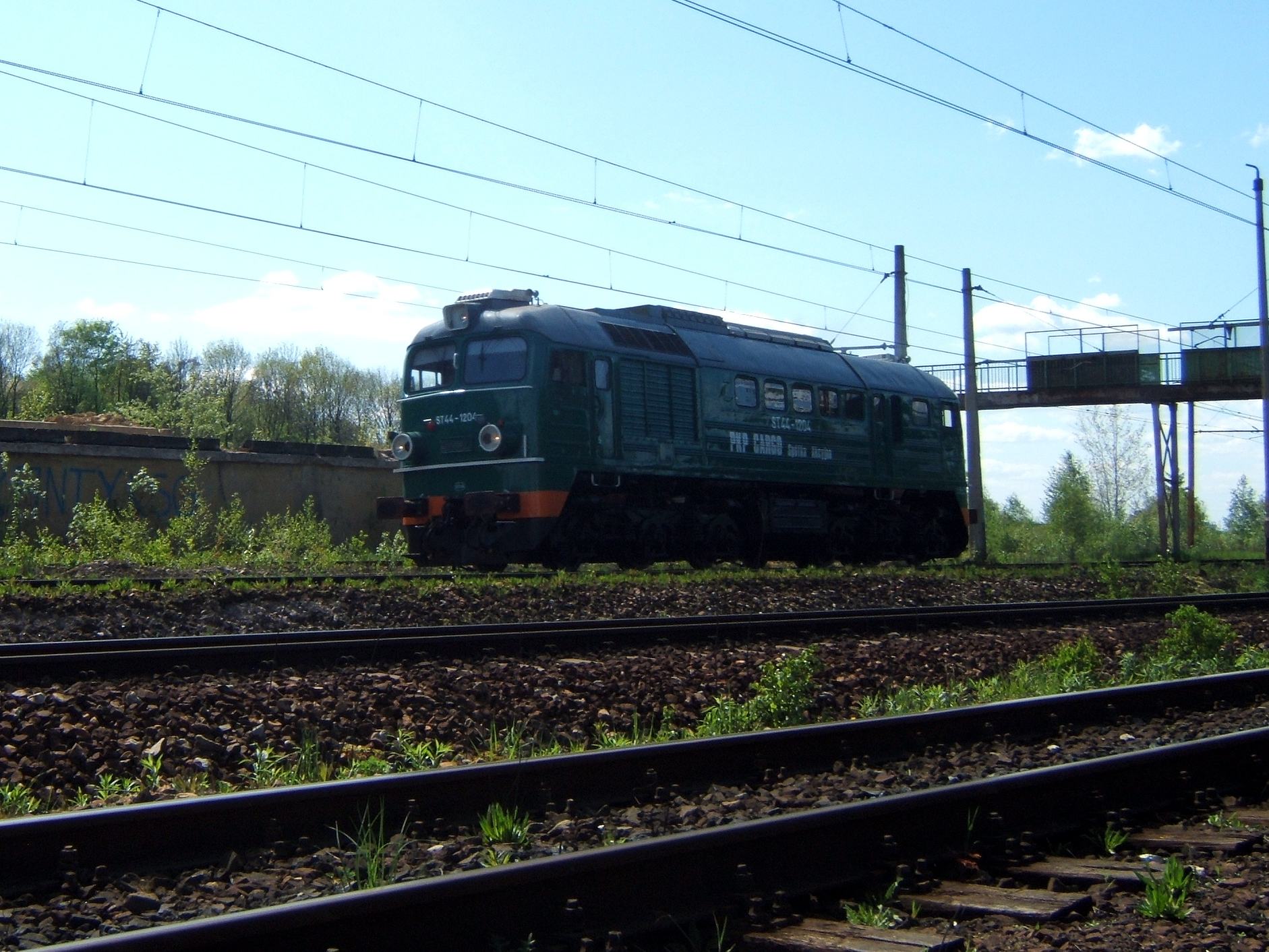 Zmodernizowany ST44-1204 (dawne oznaczenie ST44-405) w Nakle Śląskim, Polska.